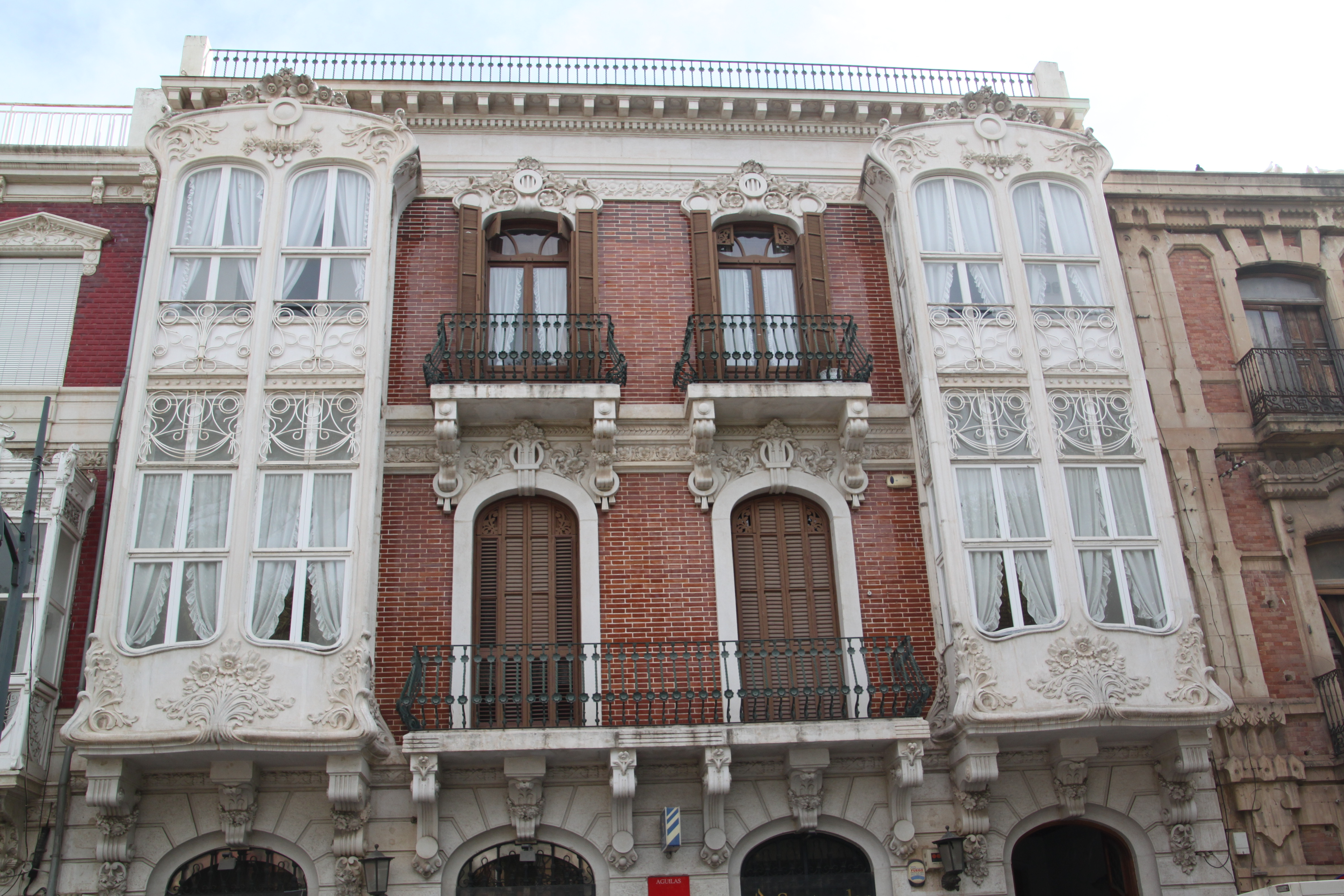 Imagen de una casa de estilo modernista en la Plaza de España de Águilas (Región de Murcia, España)